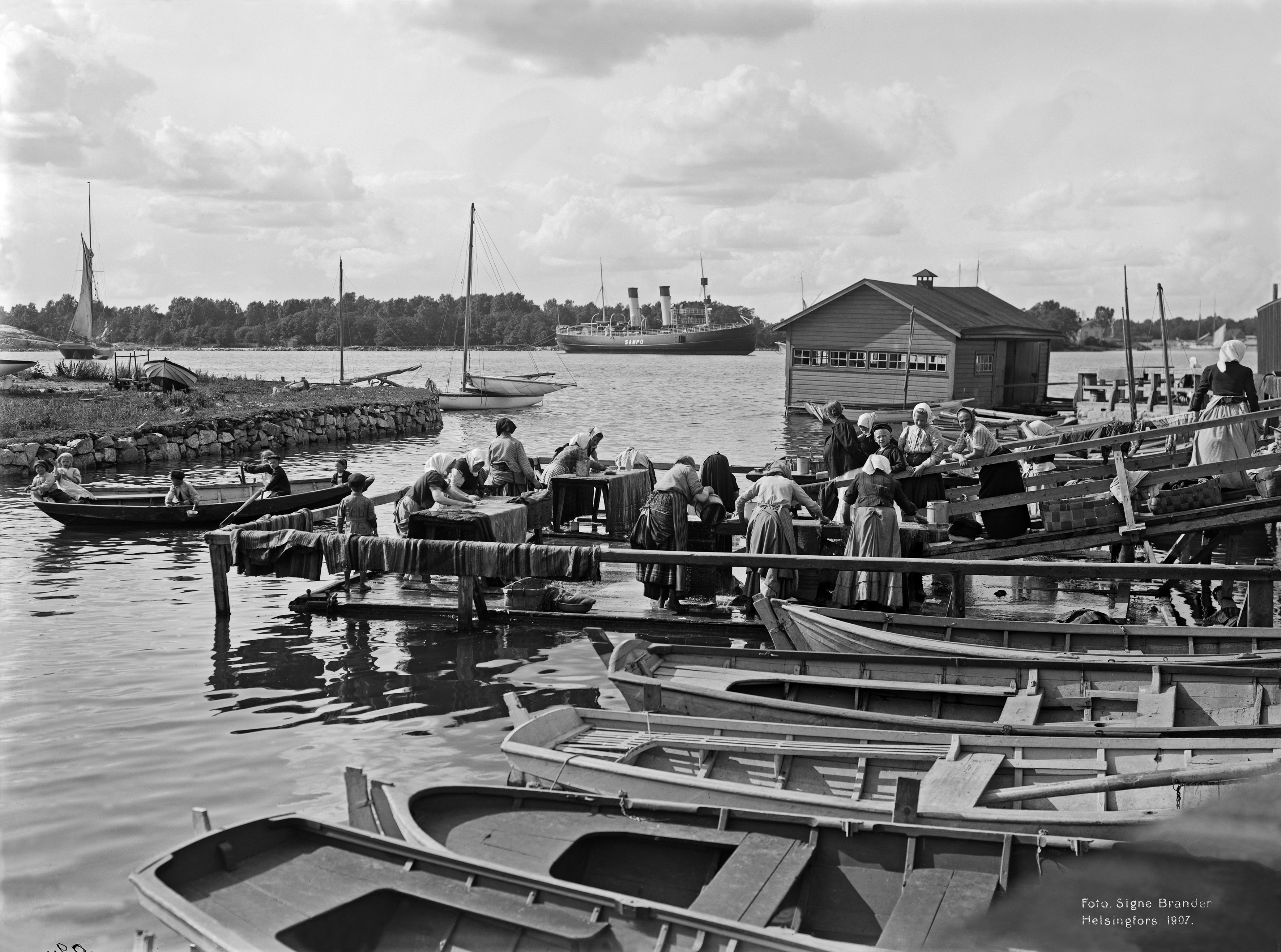 Matonpesulaituri Munkkisaaren salmessa. Taustalla Jätkäsaari ja jäänmurtaja s/s Sampo. -- negatiivi ja vedos, lasi paperi pahvi, mv